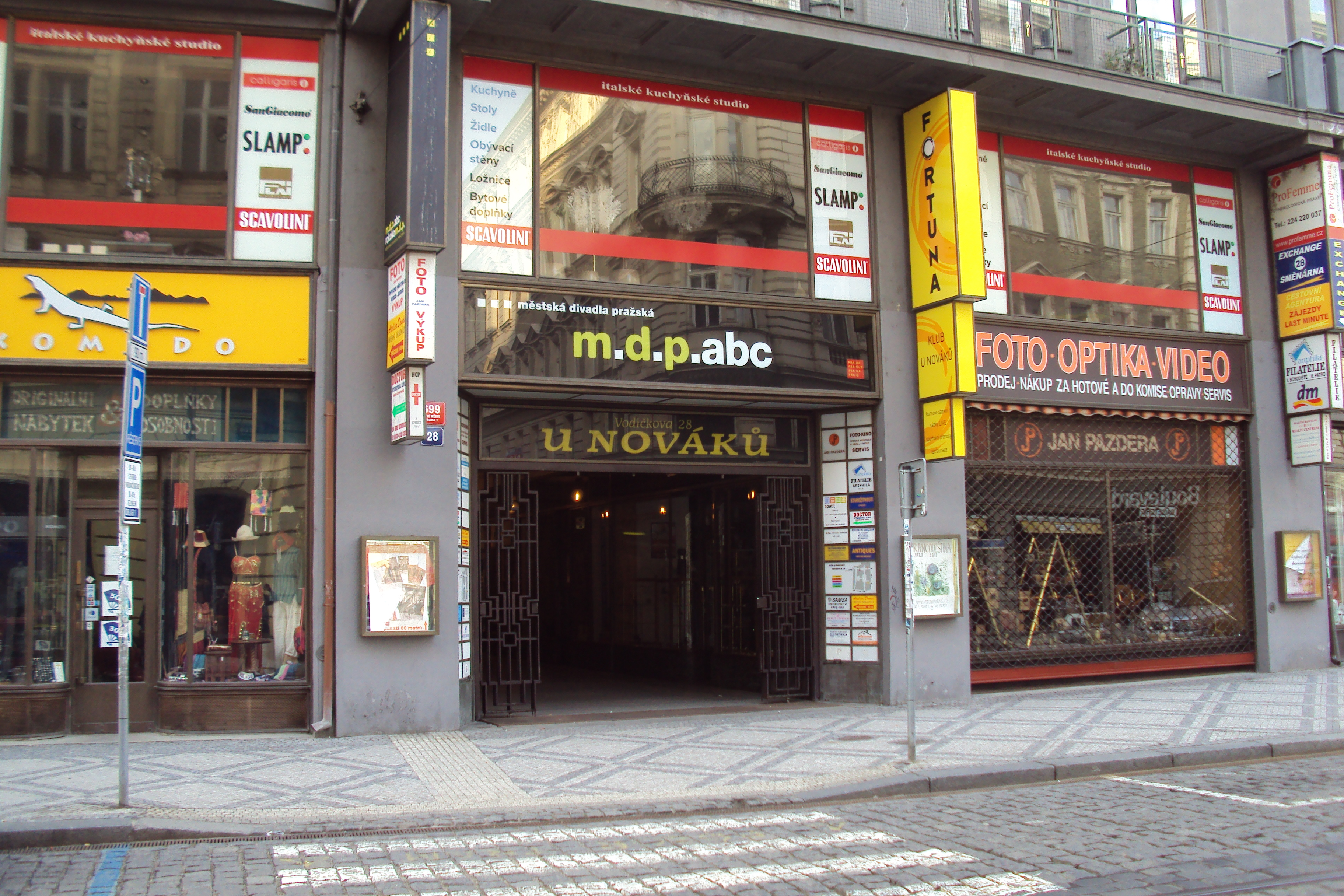 U Nováků , Vodičkova ulice, Praha 1